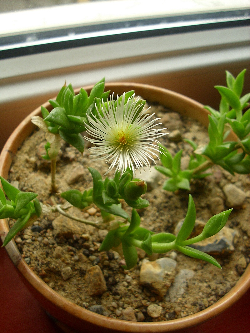 kanna